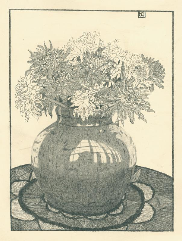 Hedwig Dülberg-Arnheim Blumenstillleben Lithographie. Laut Beschreibung des Verkäufers von 1912 (da war Arnheim 18 Jahre alt)